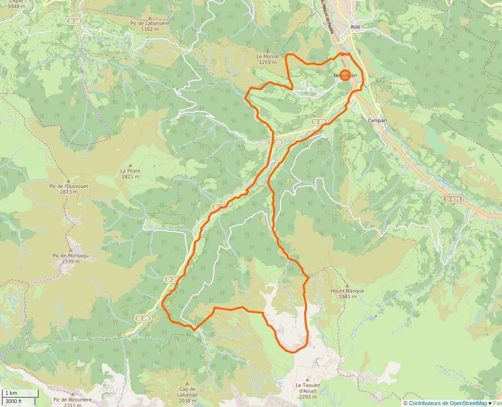 Carte de la commune de Beaudéan, issue d'OpenStreetMap